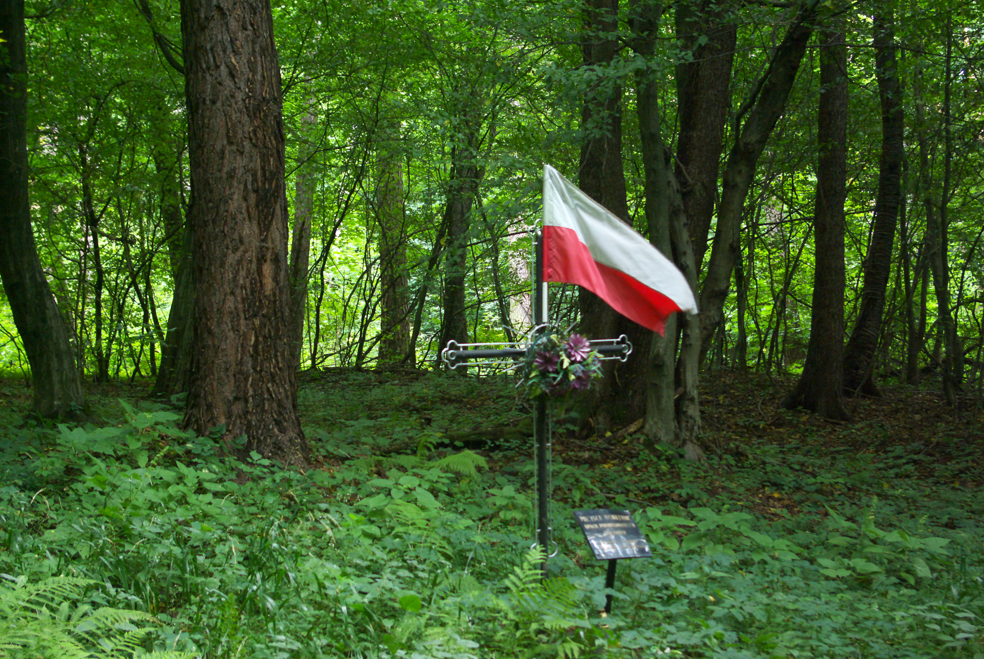 Miejsce pamięci w Olchowcach, upamiętniające ofiary egzekucji dokonanych przez Niemców od 1942 do 1944.